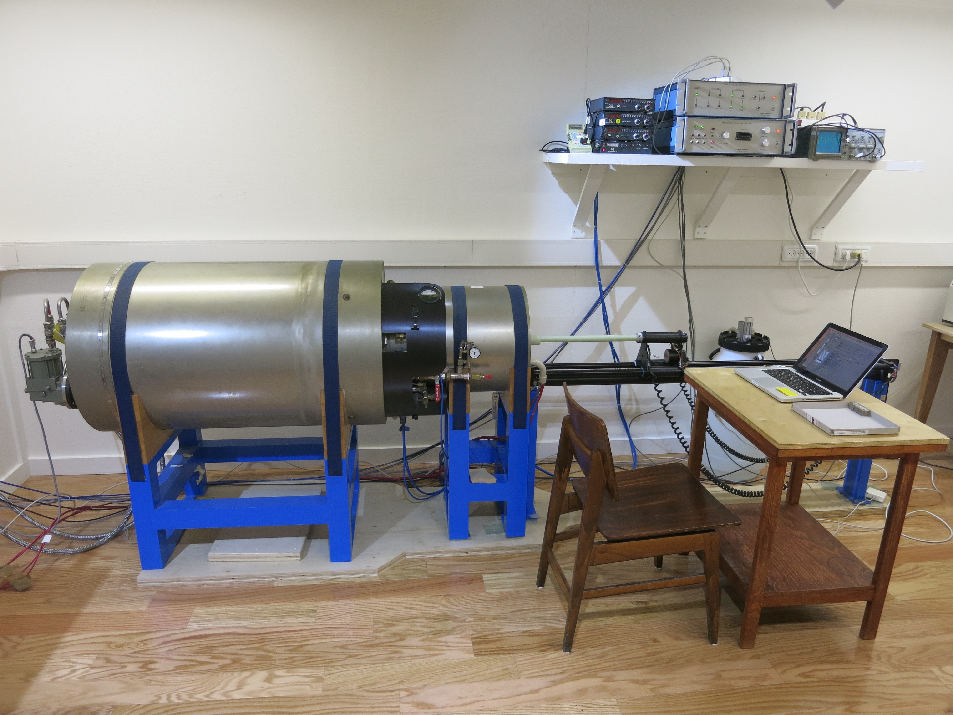 מגנטומטר קריוגני